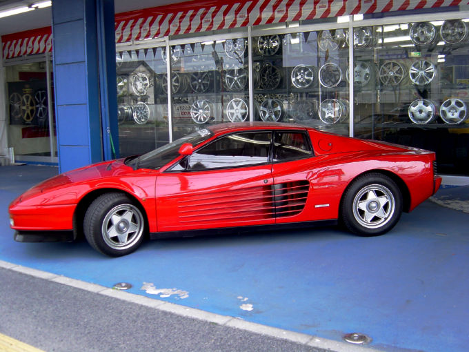 Ferrari-TESTAROSSA(フェラーリ),Hiroshima Japan